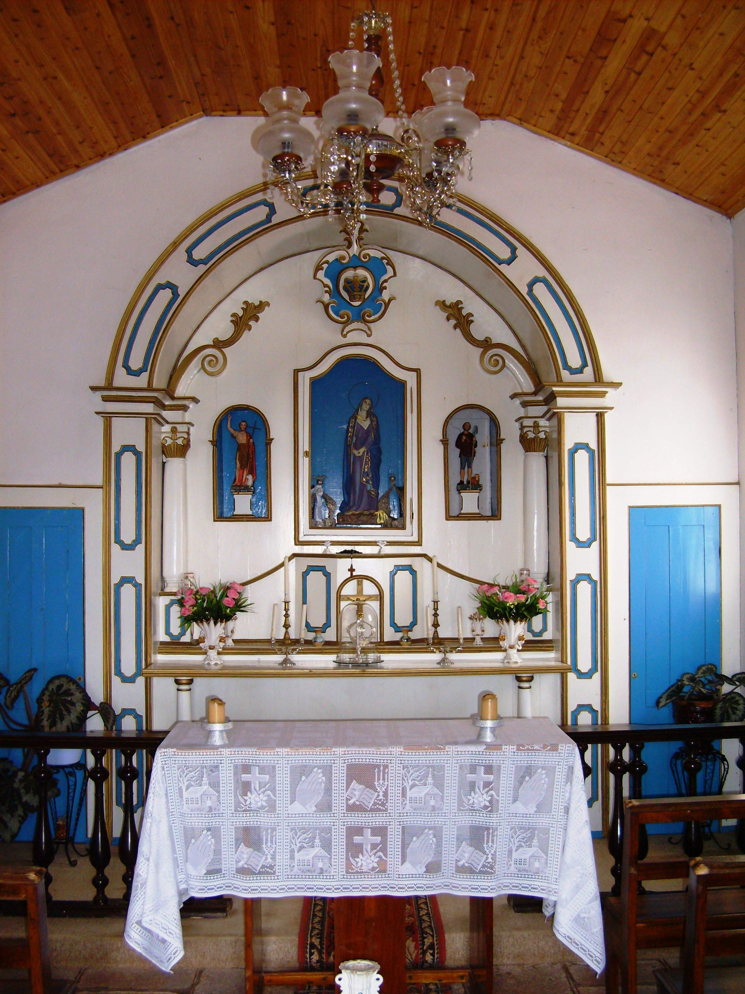 Ermida de Nossa Senhora da Piedade, Ilha de Santa Maria (Açores), Portugal.